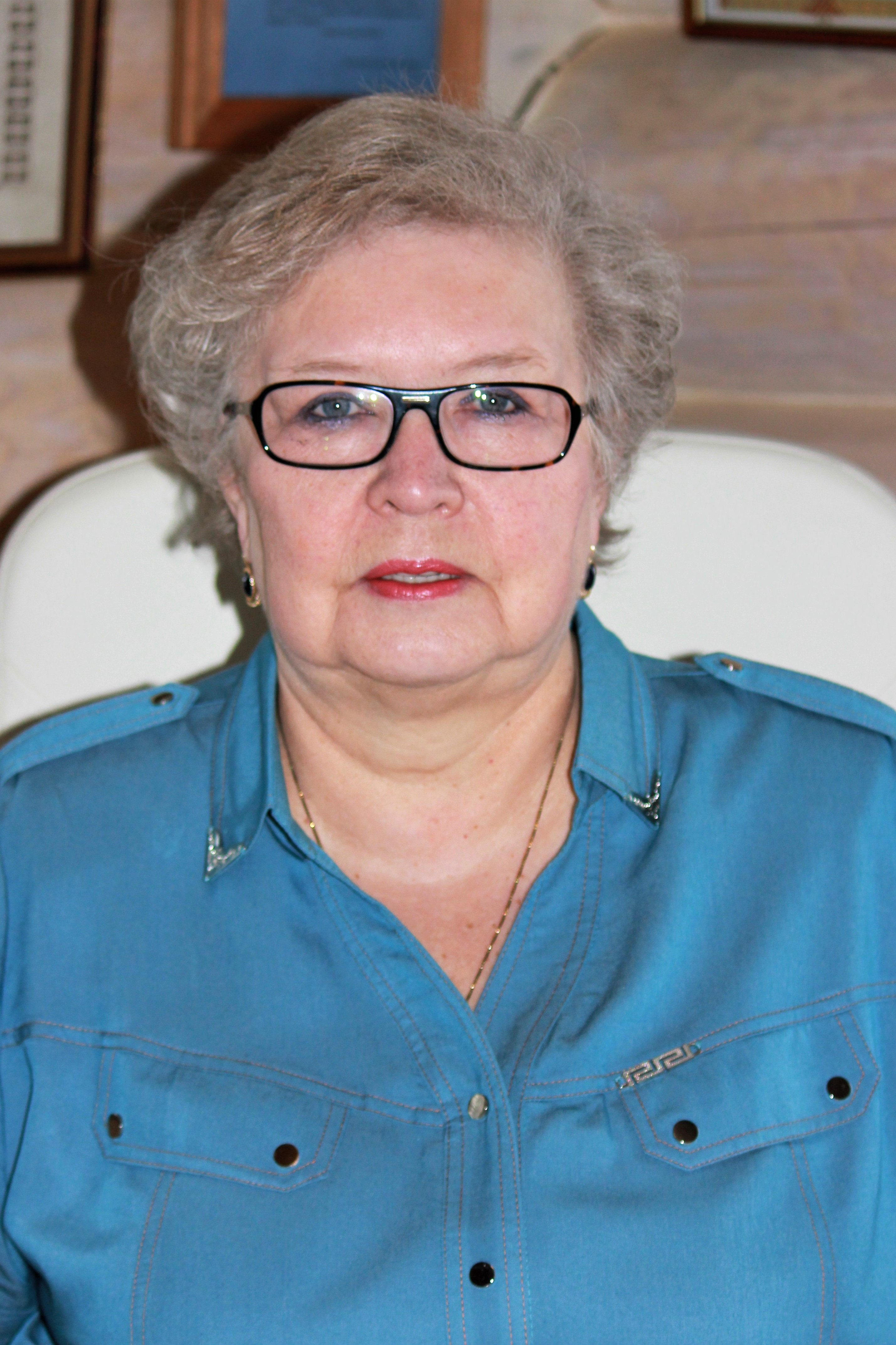 Доктор исторических наук, руководитель Центра по изучению современного балканского кризиса Института славяноведения РАН